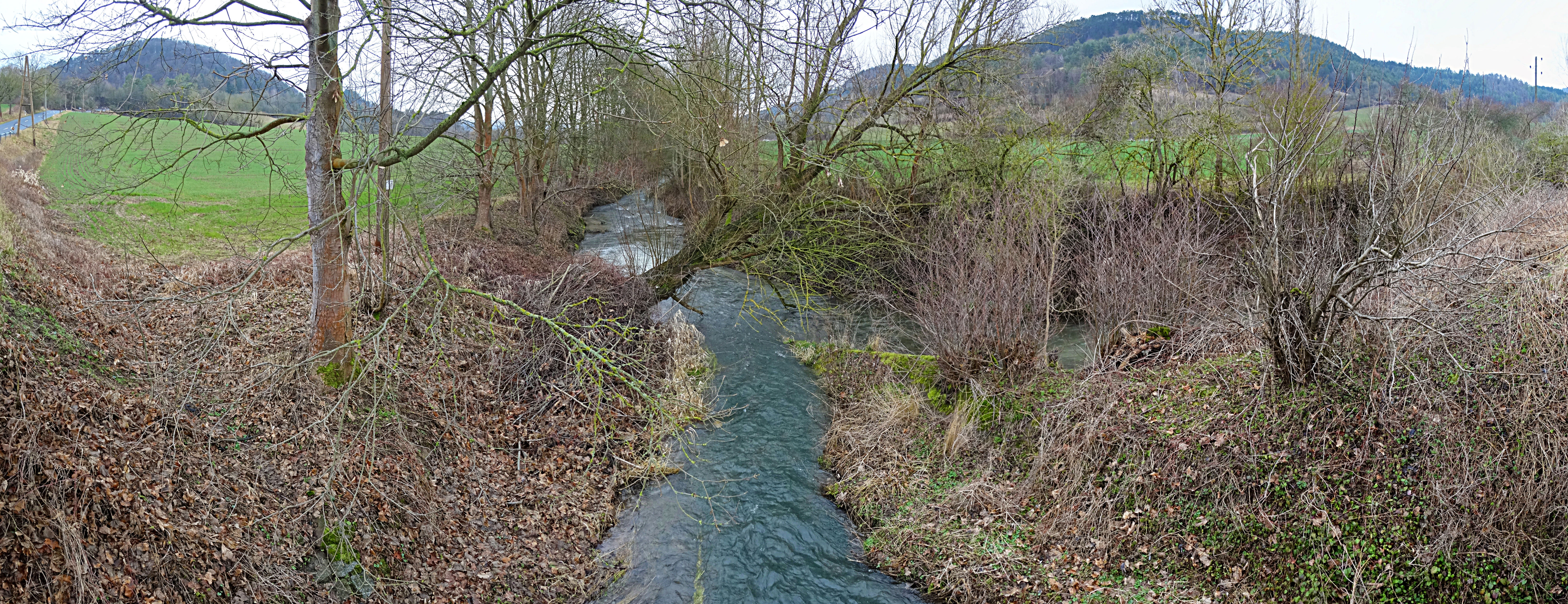 Zusammenfluss von Frieda und Lutter (rechts von Großbartloff kommend) mit Hülfensberg (links) und Rollsberg (rechts